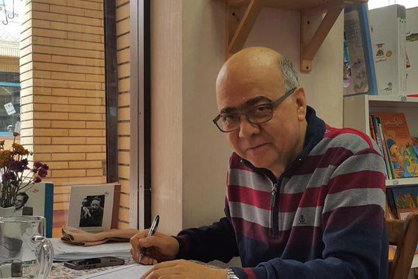 استاد سعید تشکری